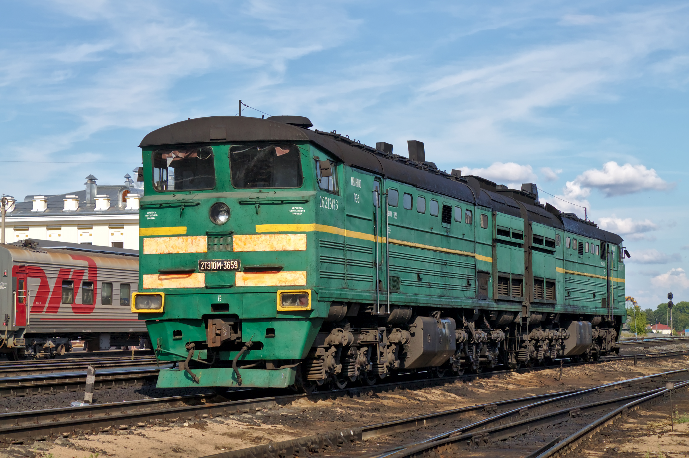 2ТЭ10М-3659, станция Рыбинск-пассажирский. см. фото 614240 в альбоме автора